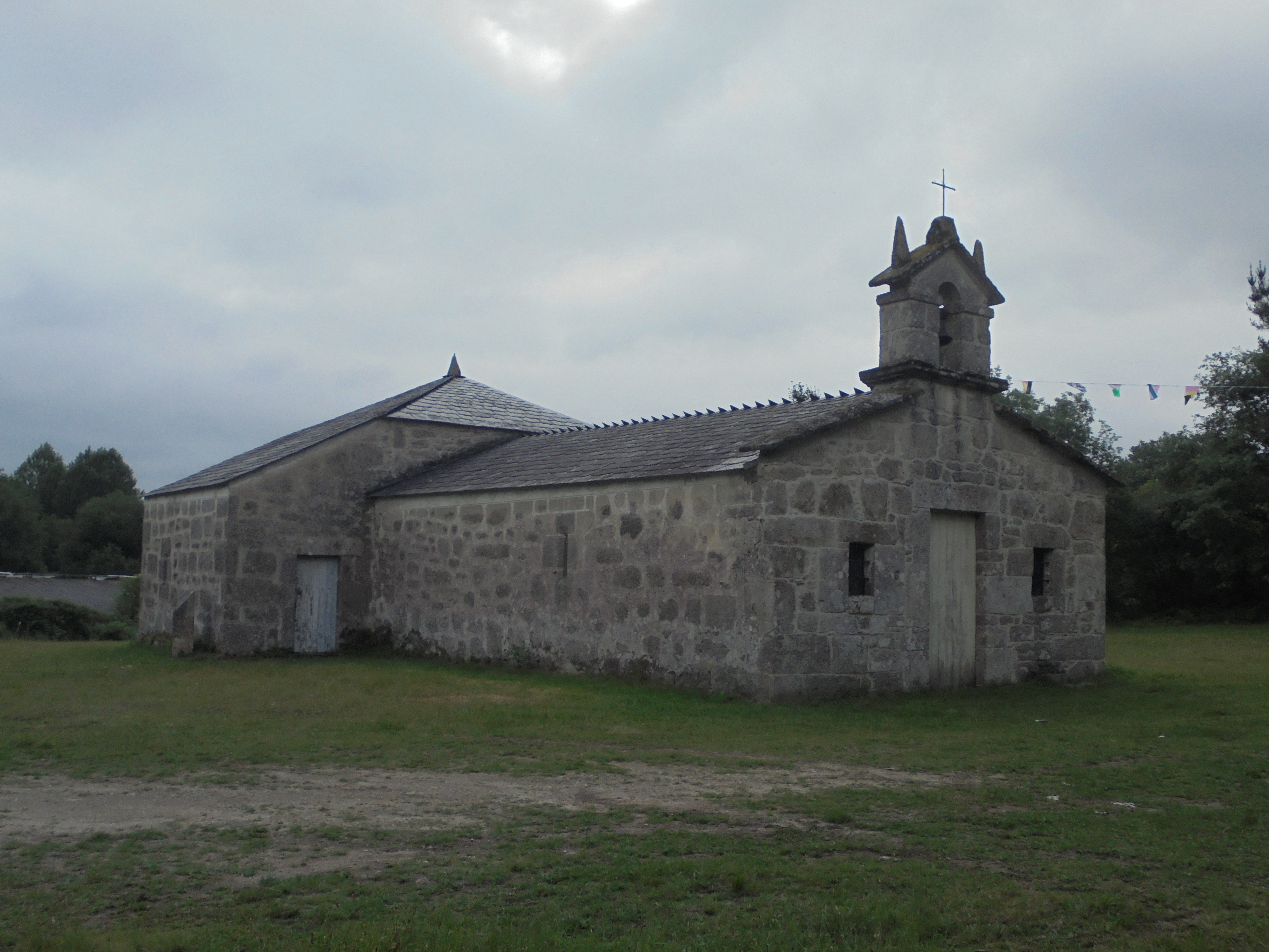 Capela das Virtudes en Pedrafita ( O Corgo)